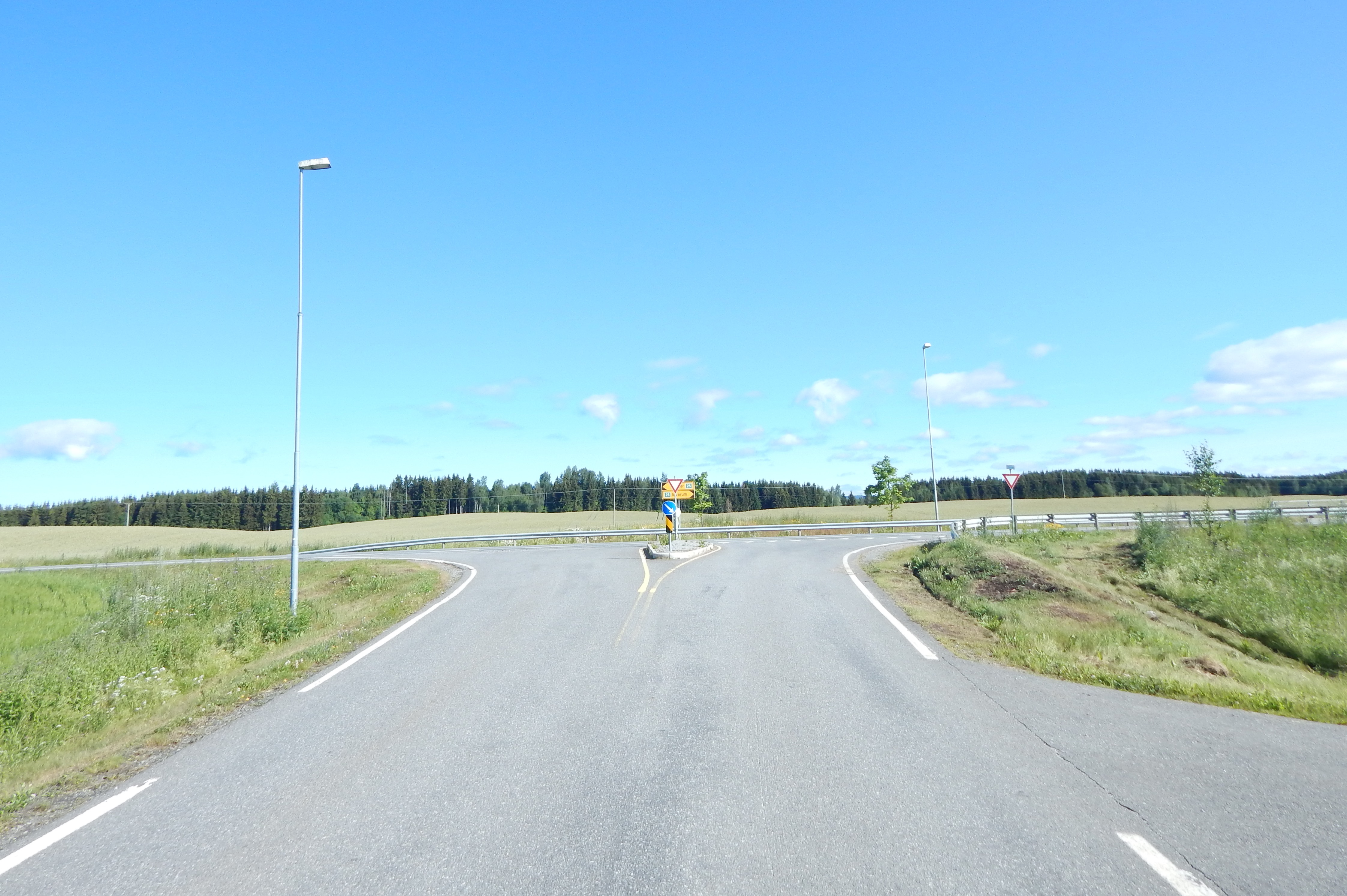 Hommelstadvegen i Vang